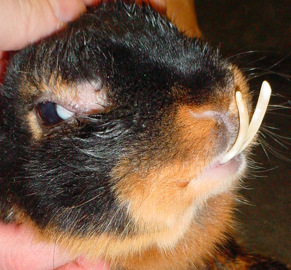 Durch Hechtgebiß beim Kaninchen verursachtes übermäßiges Längenwachstum der unteren Schneidzähne Autor: Kalumet